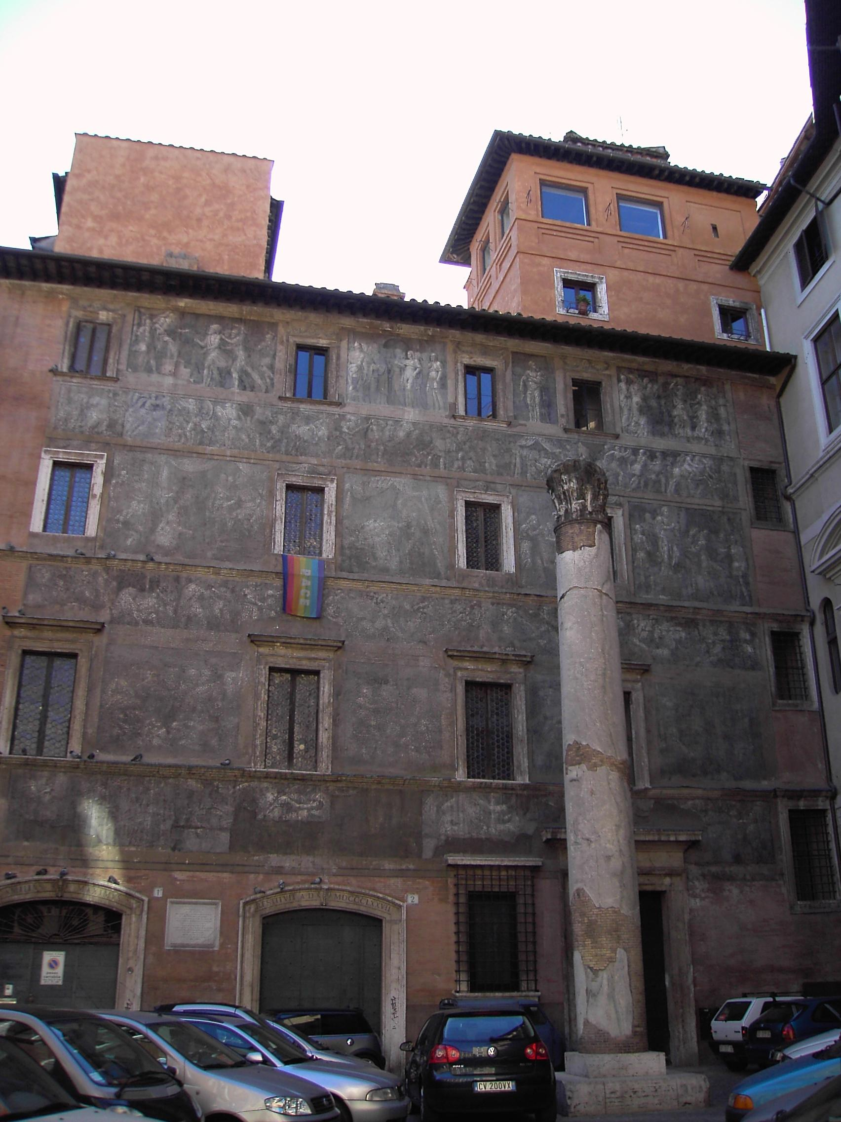 Roma, piazza dei Massimi, il retro di Palazzo Massimo alle Colonne con l'unica colonna sopravvissuta dell'Odeon di Domiziano.